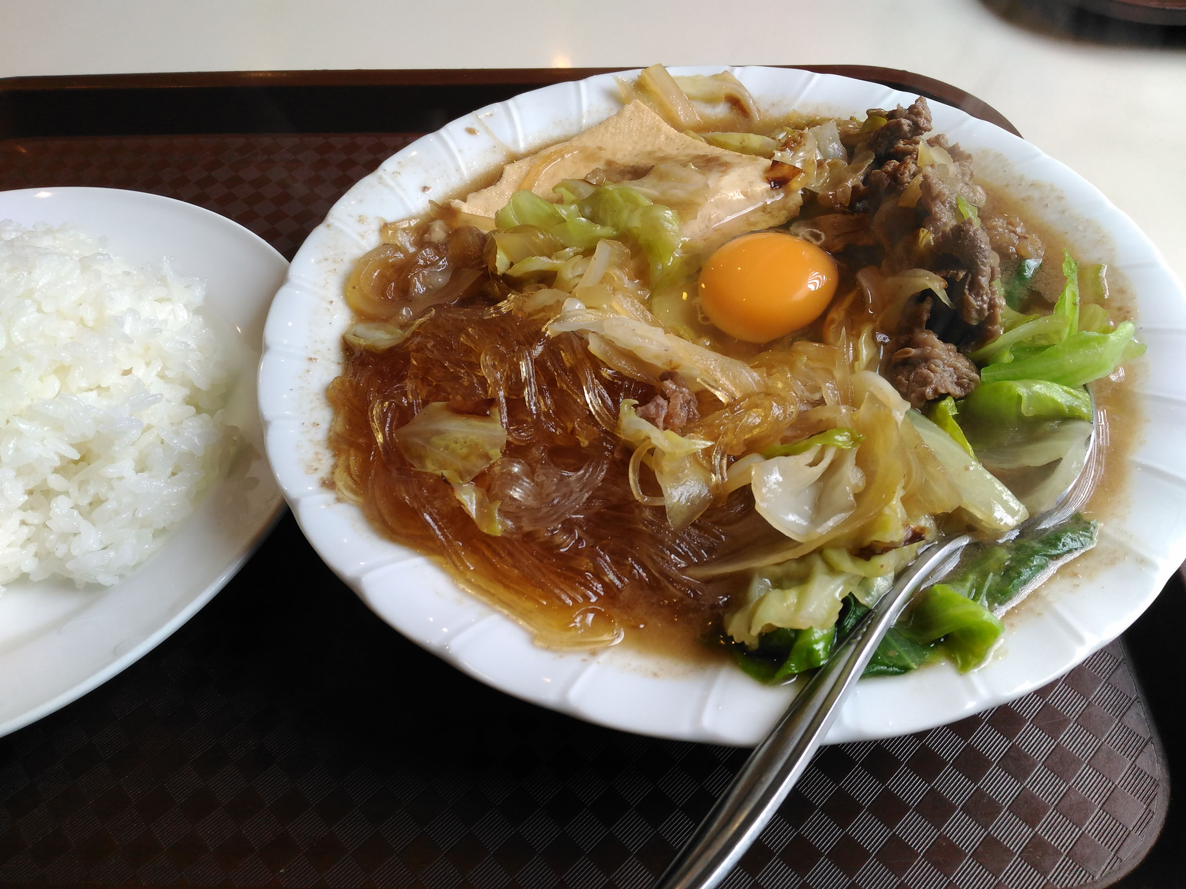 沖縄県那覇市 三笠松山店のスキヤキ